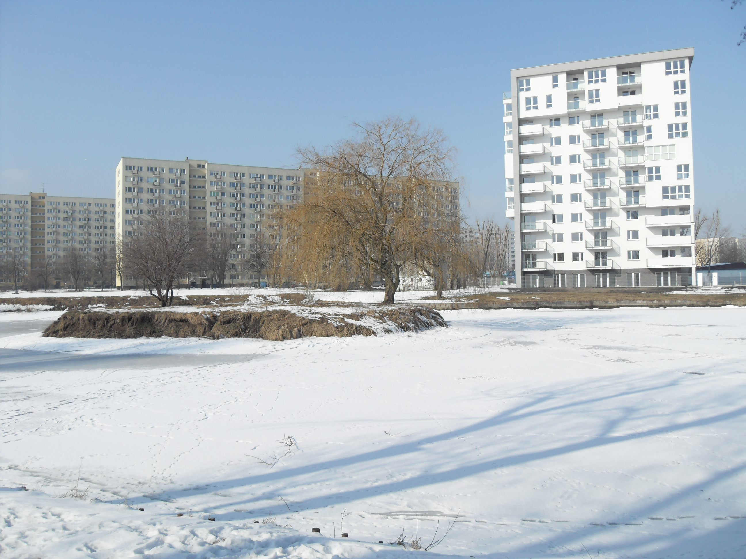 Gdańsk Przymorze, Potok Oliwski - zamarznięty staw i wyspa (zbiornik retencyjny "Chłopska") oraz pierwsze bloki Żabianki. Po prawej "Wieża Leszka Białego".